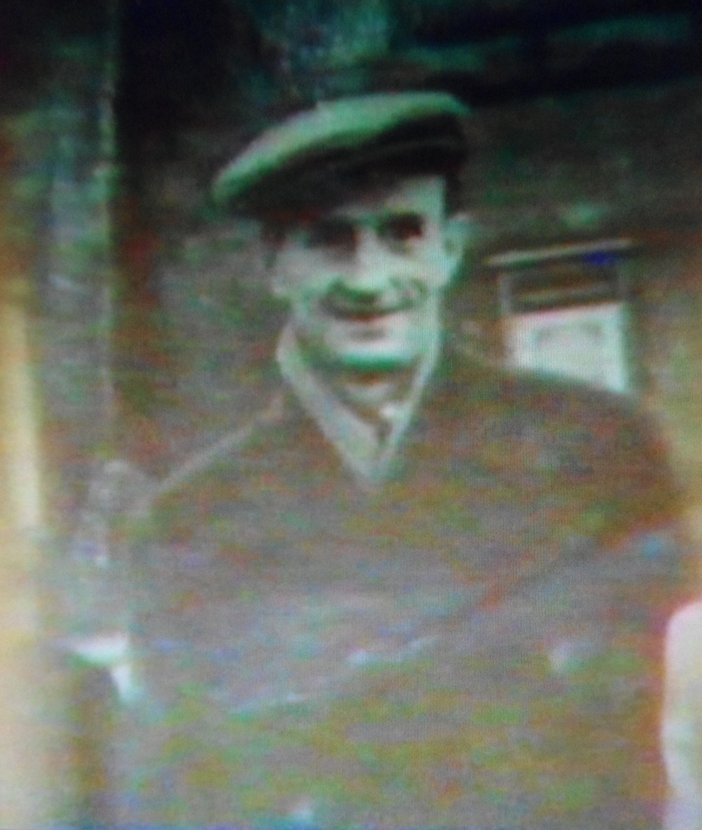 Mehmet Dermani (31 janar 1911 - 25 prill 1986)